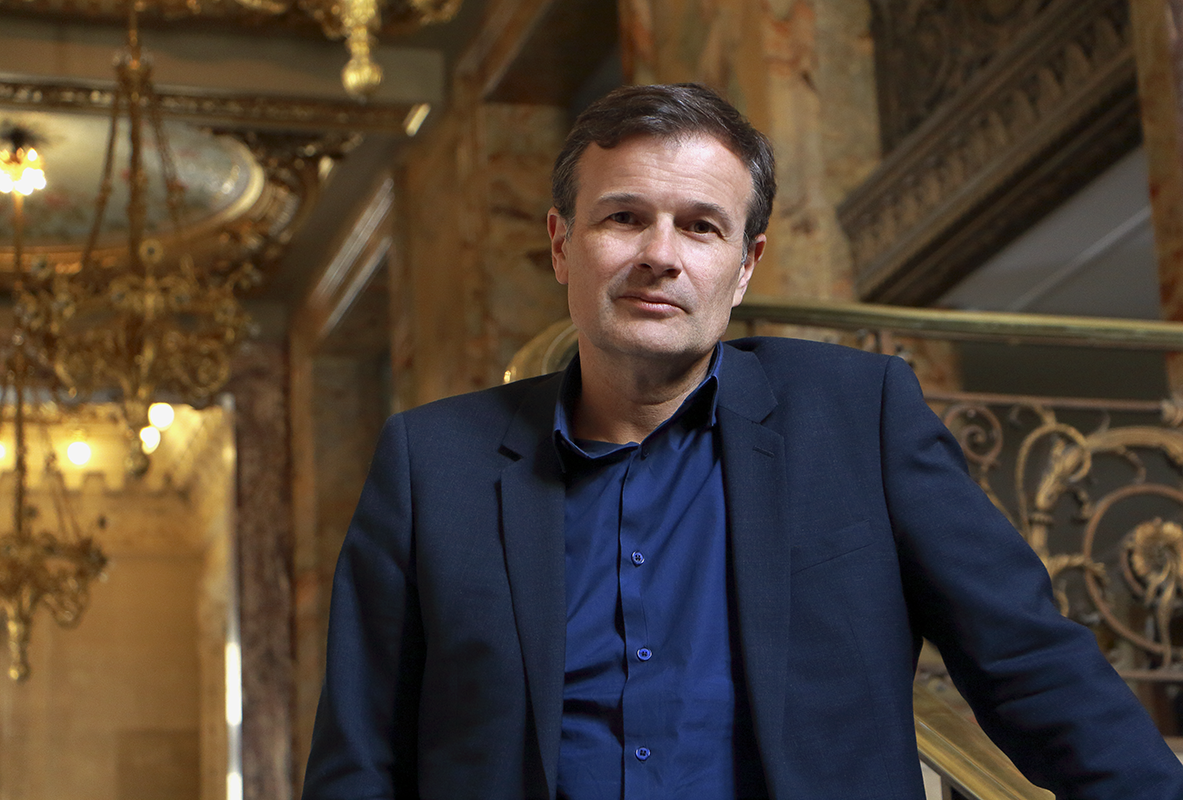 Olivier Mantei